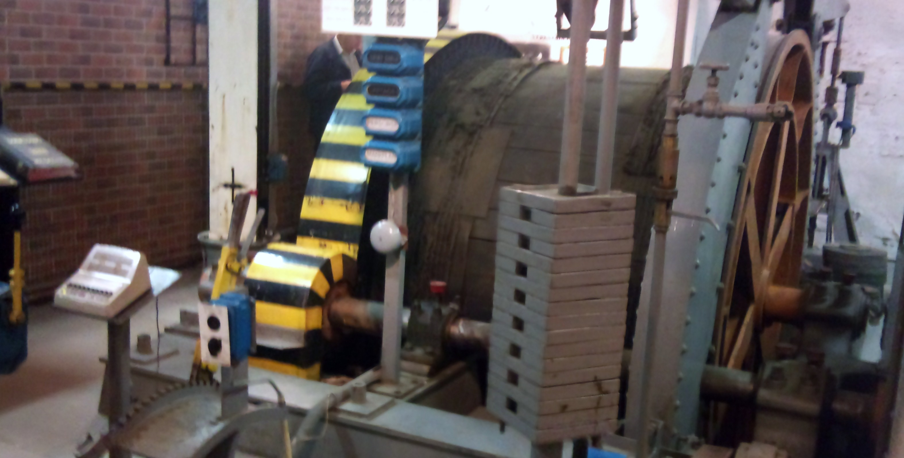 Gruvhiss